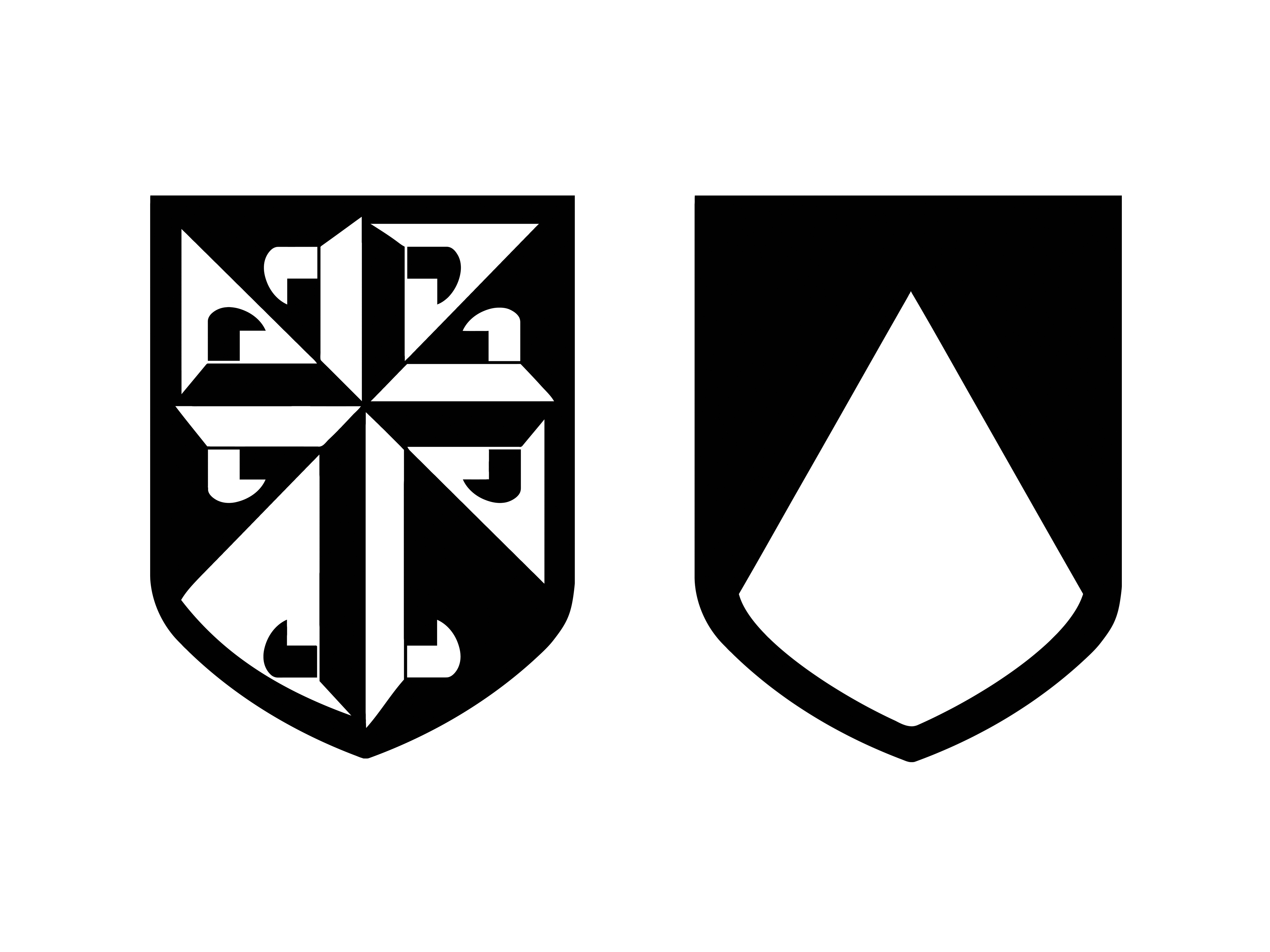 Escudos de la Orden de Predicadores